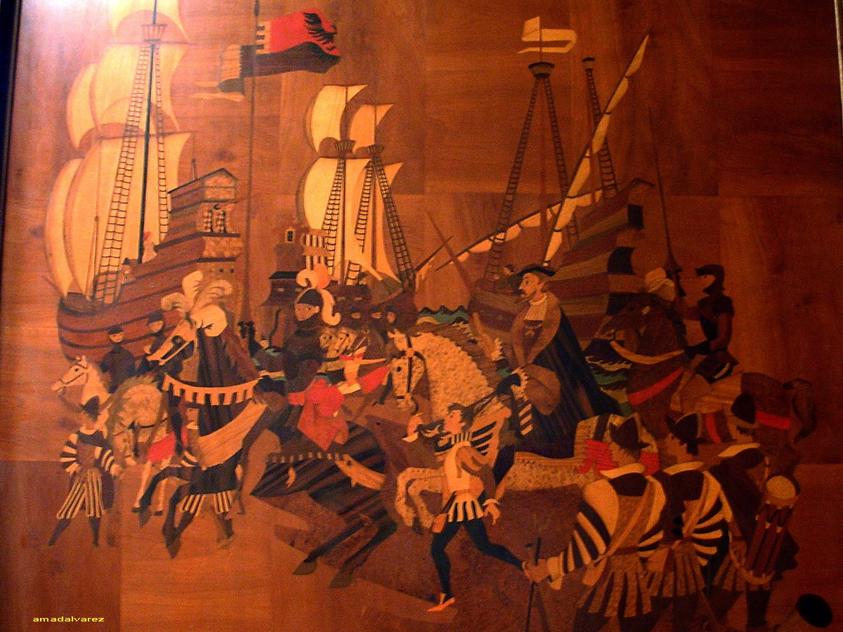 Detall de la marqueteria de la Sala Consolat de Mar a la Casa de la Ciutat de Barcelona, obra d'Evarist Mora i Rosselló (1958).